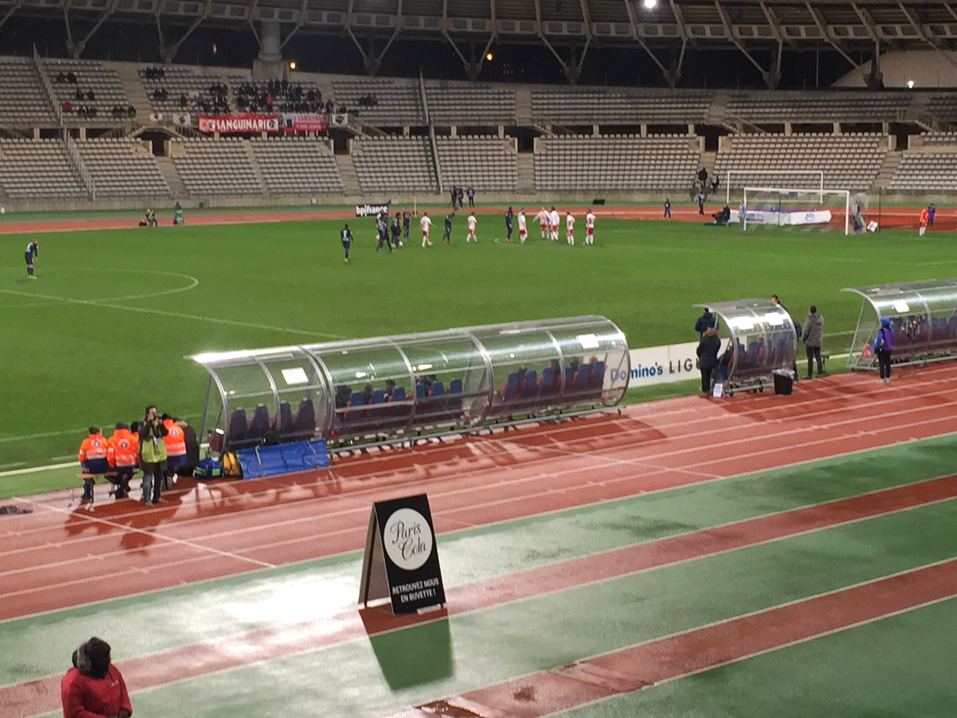 Paris FC-AC Ajaccio 22/012018